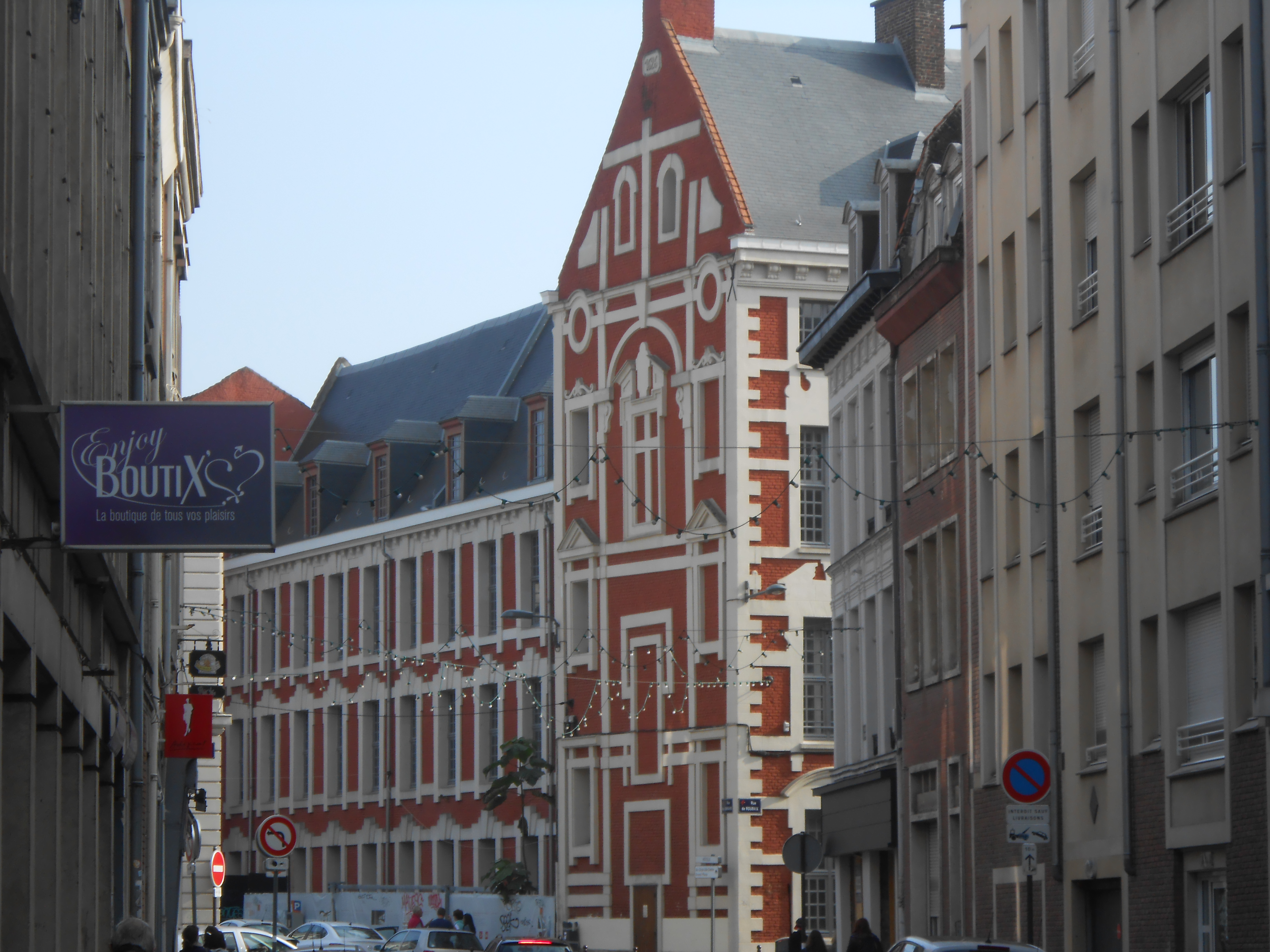 Ecole des arts industriels et des mines (Ecole centrale de Lille) rue du Lombard Lille France (1854)